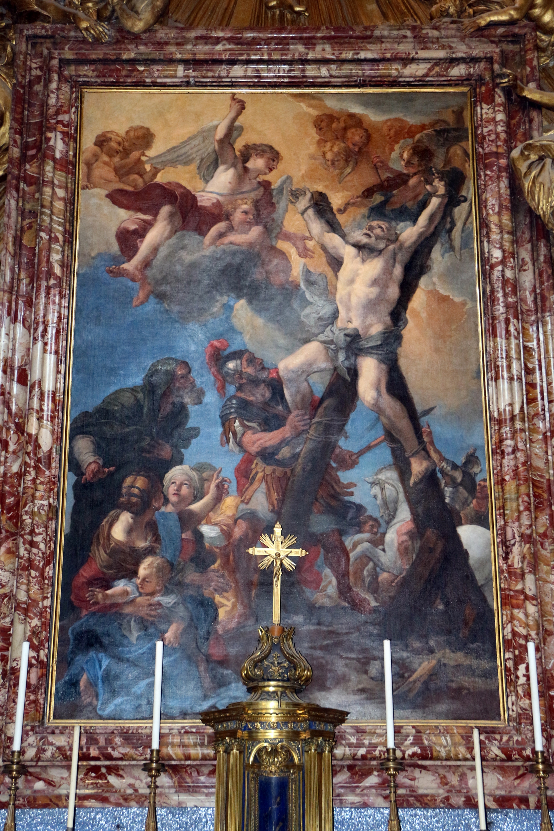 Borgognone, martirio di sant'andrea, 1668, 02.JPG